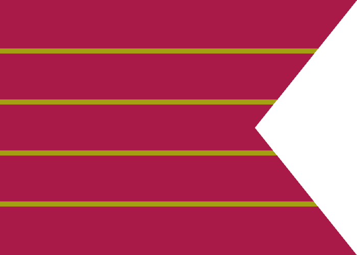 Pendón de Mansilla del Páramo